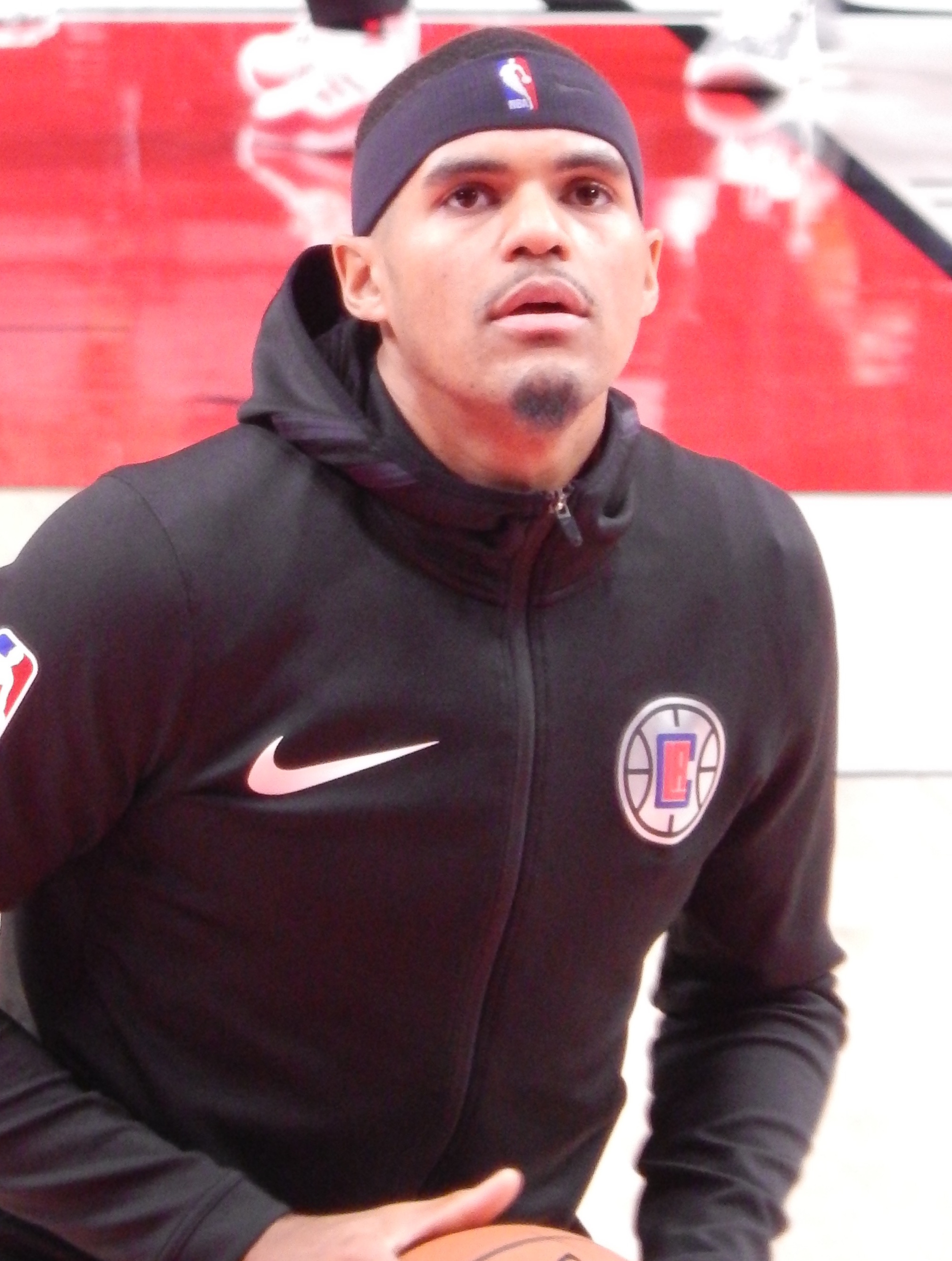 Tobias Harris #34 of the Los Angeles Clippers against the Portland Trail Blazers on November 8, 2018 at Moda Center in Portland, Oregon.